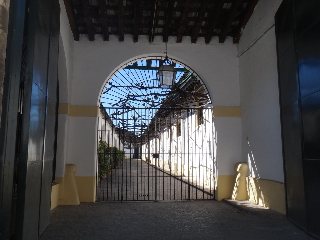 Bodegas Domecq en Jerez de la Frontera (Andalucía, España)